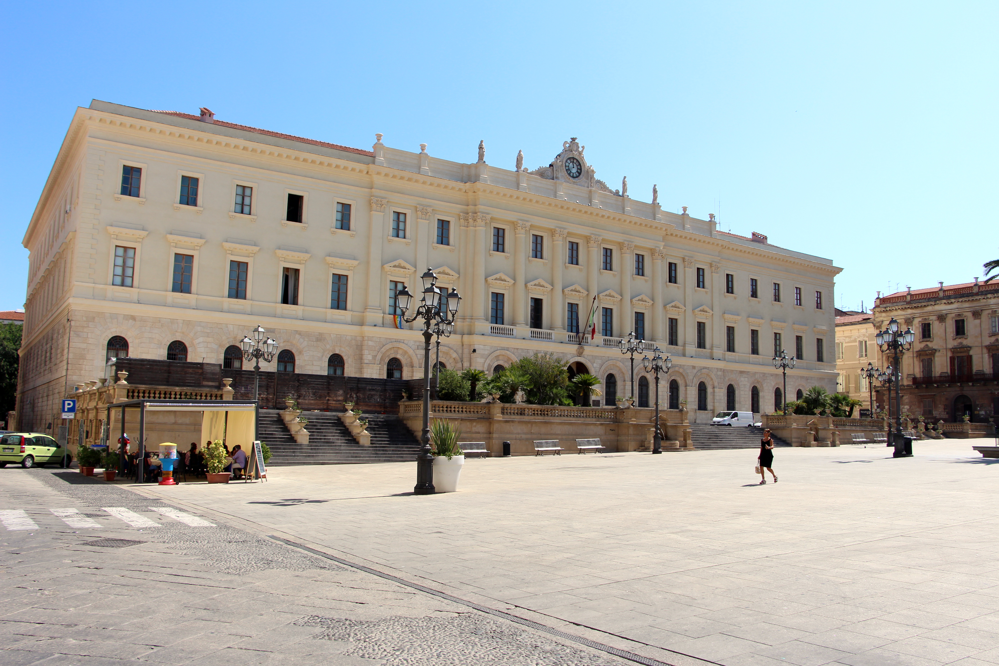 Sassari